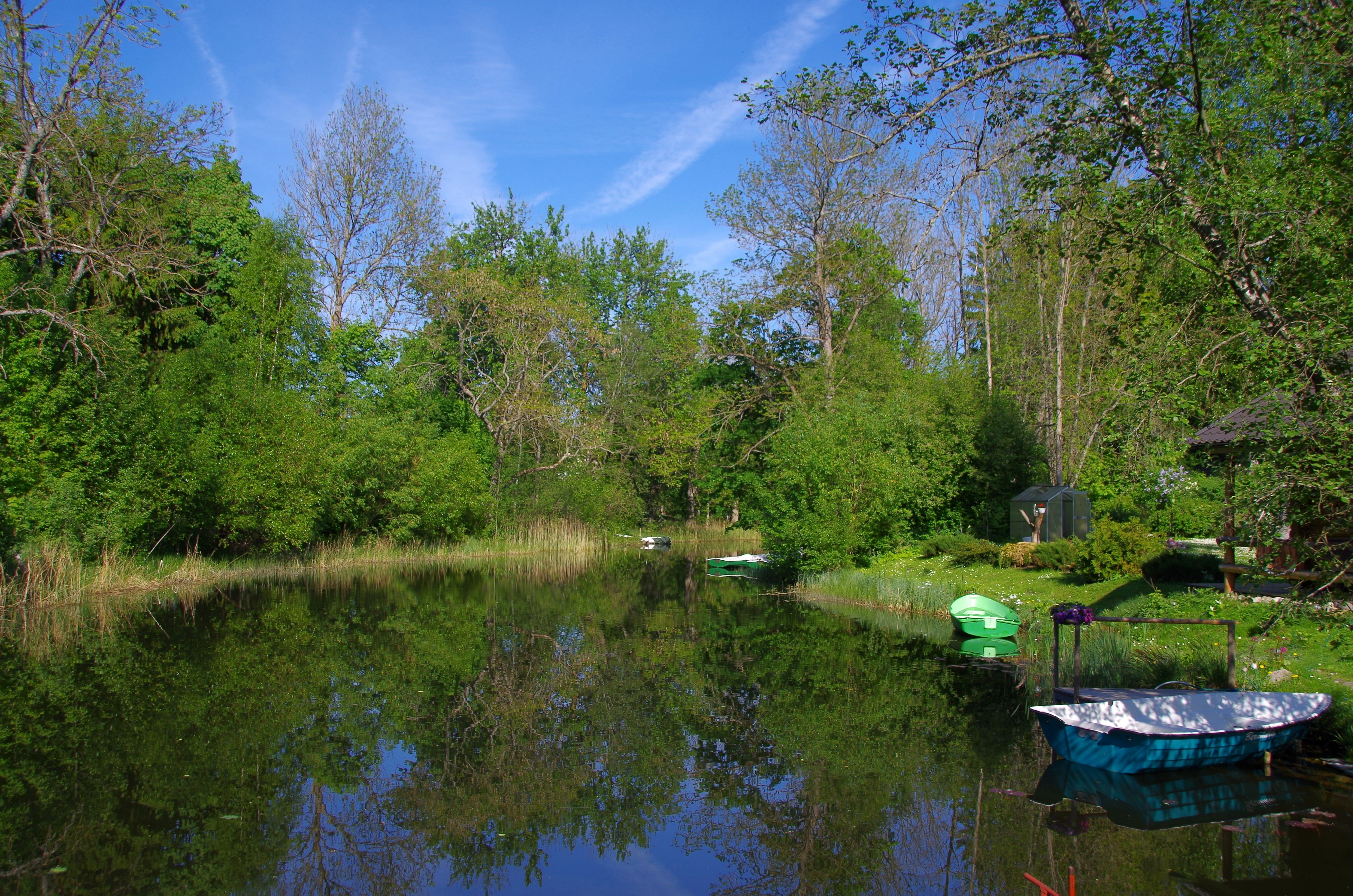 Mudajõgi (ka Mudaoja) on Amme jõe parempoolne lisajõgi.Jõgi saab alguse Saadjärvest